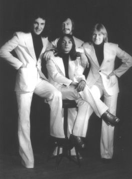 Polska grupa muzyczna KRAM, zdjęcie zostało wykonane w klubie studenckim Karuzela w Warszawie, od lewej: Ryszard Pokorski, Wojtek Nowak (tył), Andrzej Wilklisz (przód), Roman Konigsmann